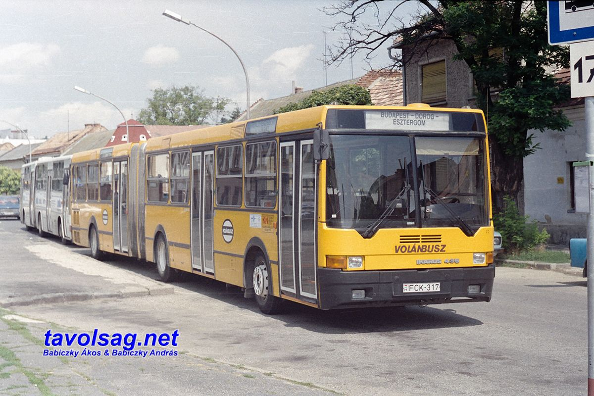 Ikarus 435 (FCK-317) városi-elővárosi csuklós autóbusz a Volánbusz járműveként az esztergomi autóbuszállomáson (gyártási év: 1995)